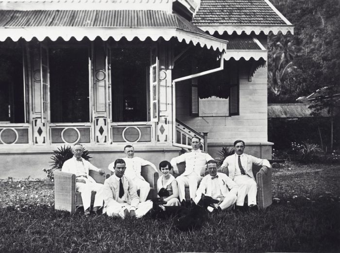 foto. Groepsportret voor het huis van Kapitein Hofstede, Tapa Toean